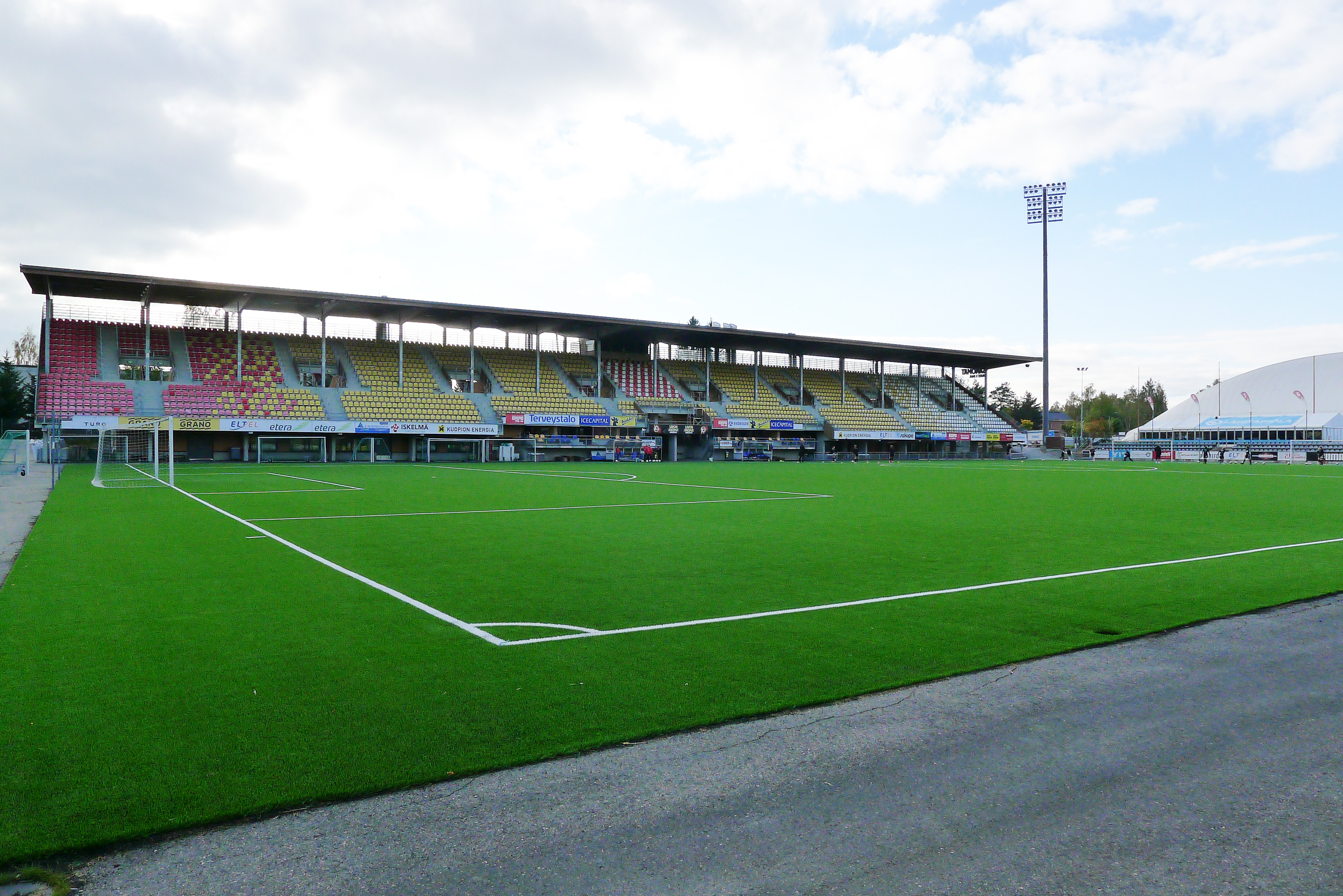 Savon Sanomat Areena 20.9.2016